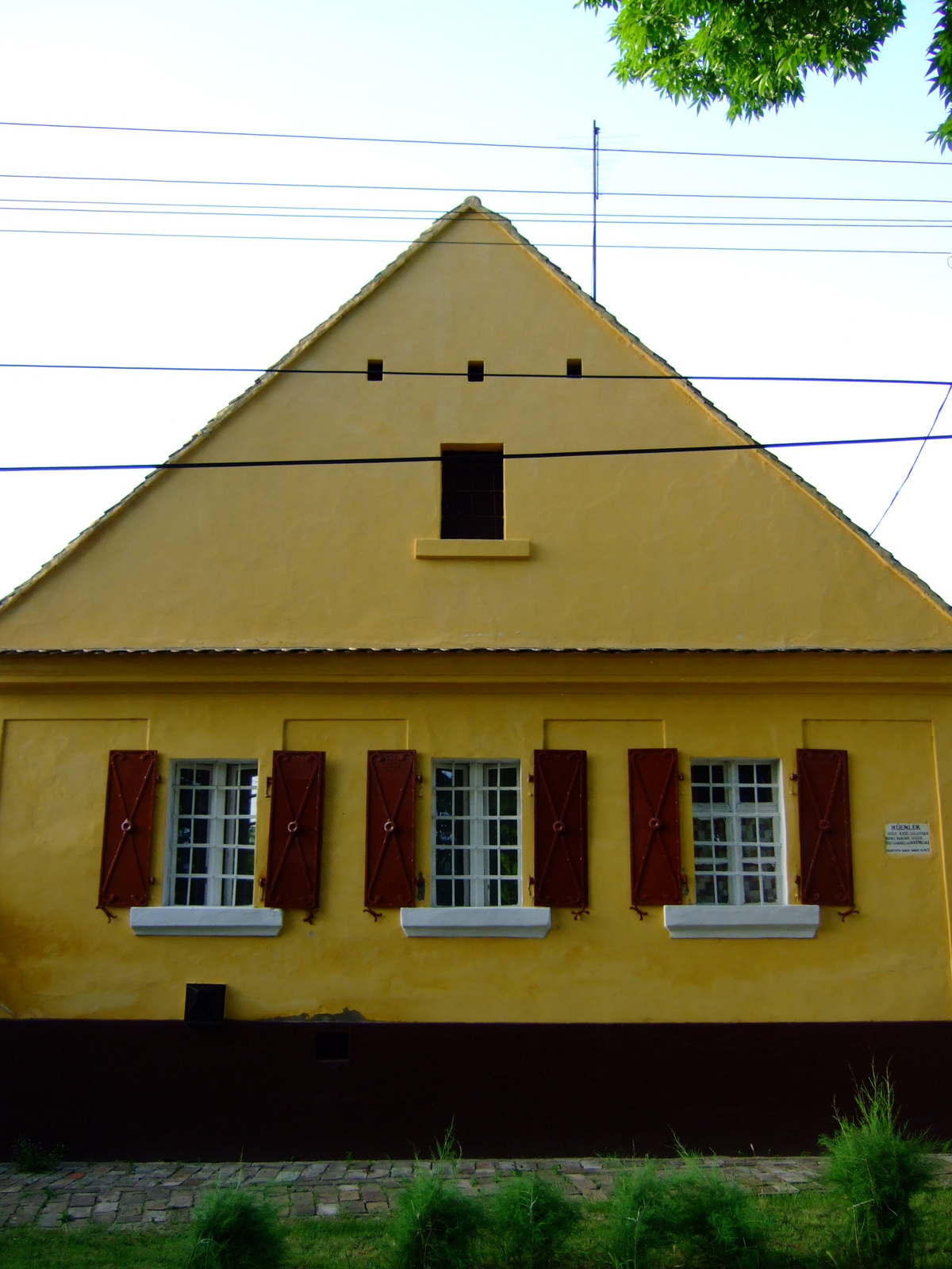 Beretvás-kúria (Nagykőrös, Sziget utca 4.) This is a photo of a monument in Hungary. Identifier: 7177